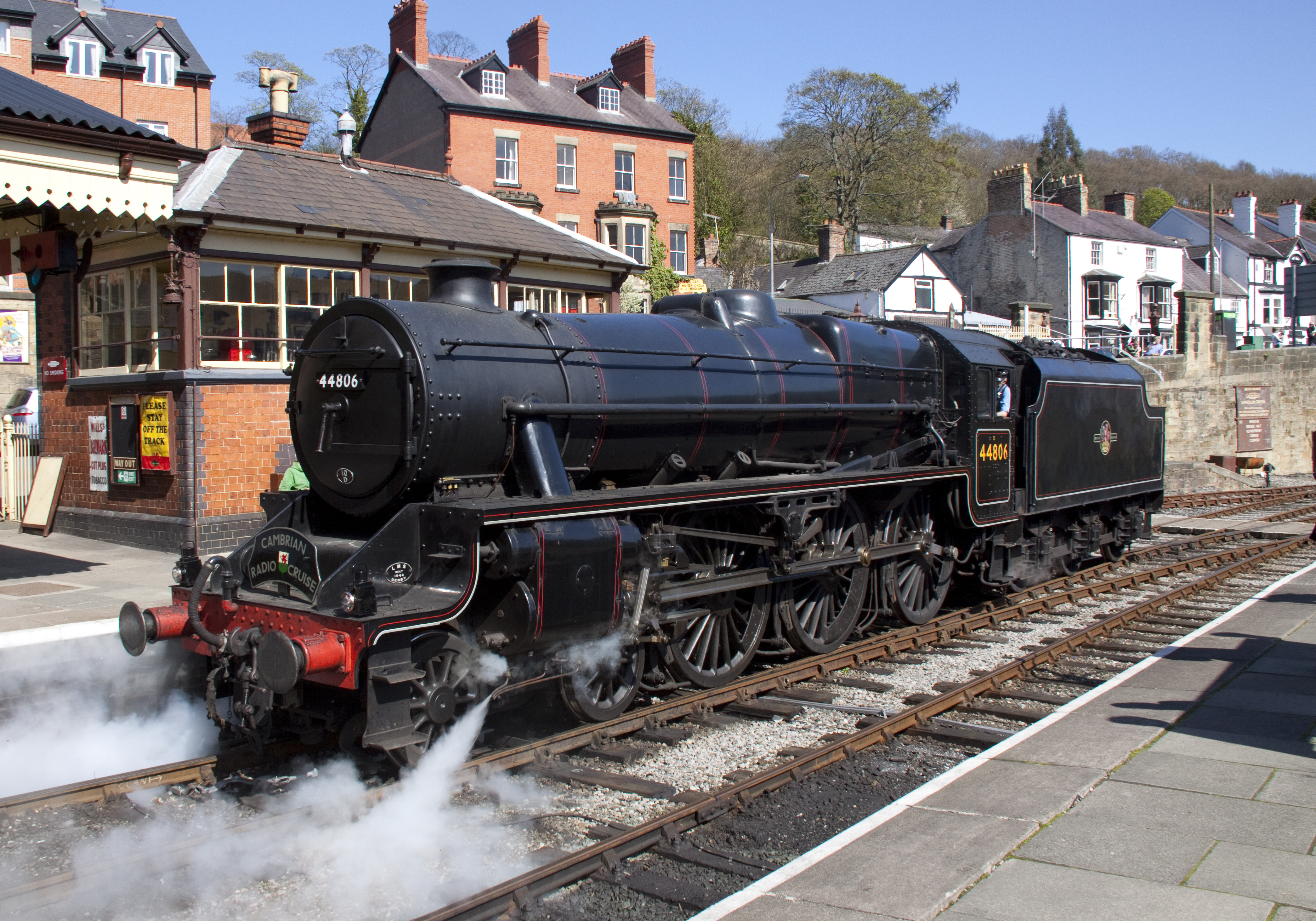 Black 5 - 44806 Llangollen Station 2